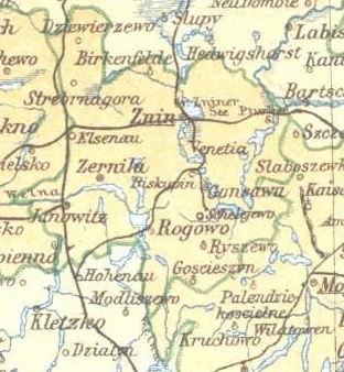 Kreis Znin as from 1887 to 1920